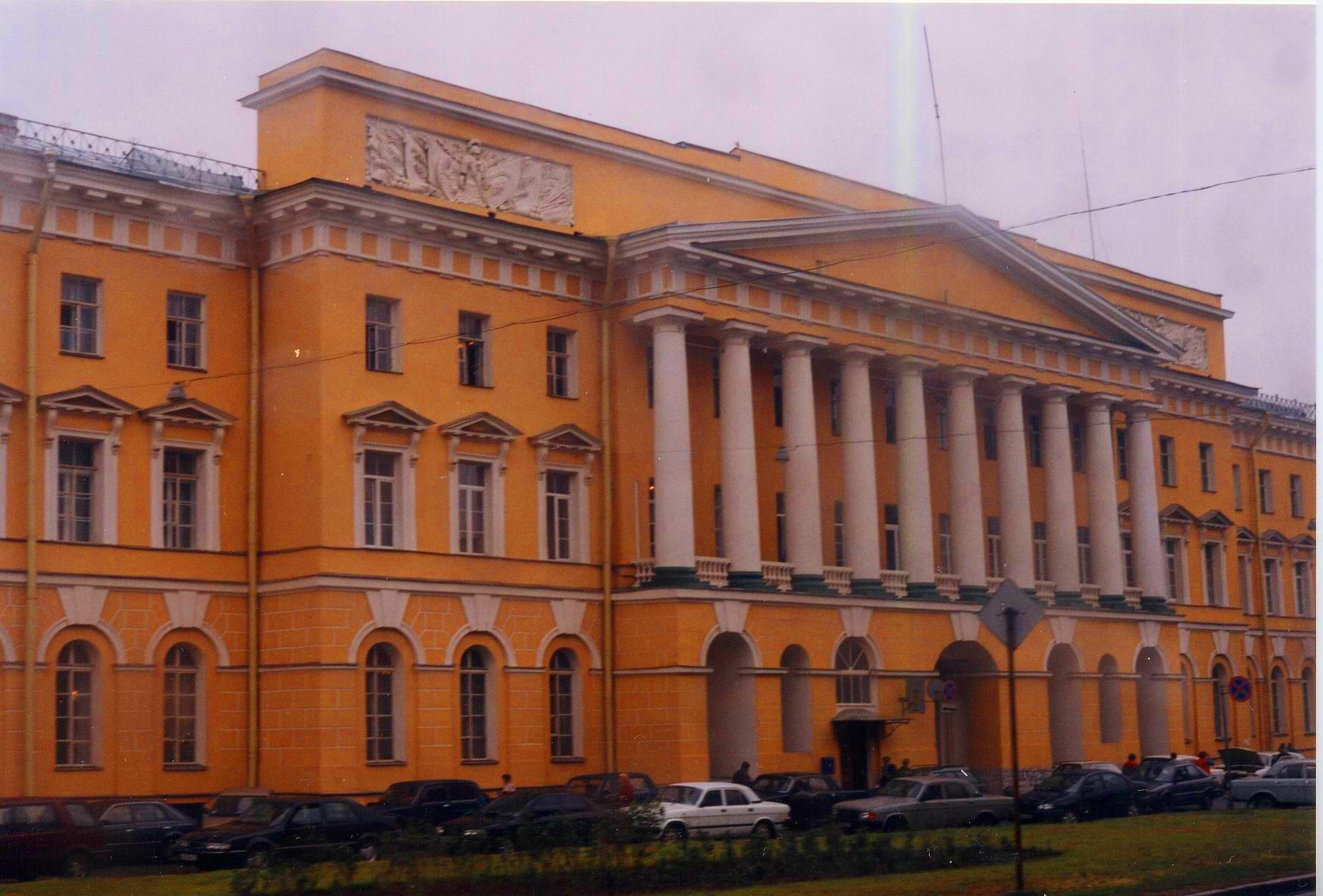 Казармы Павловского полка (Санкт-Петербург, Марсово поле, 1, Миллионная улица, 2, Аптекарский переулок, 2)